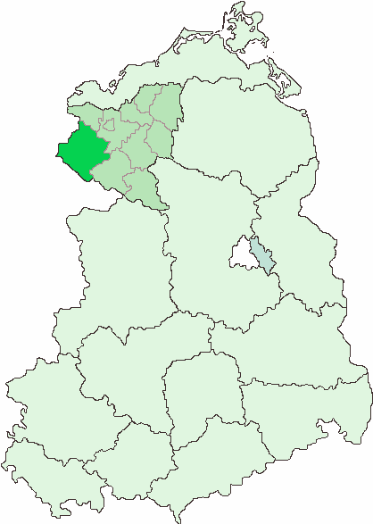 Lage des Kreises Hagenow im Bezirk Schwerin